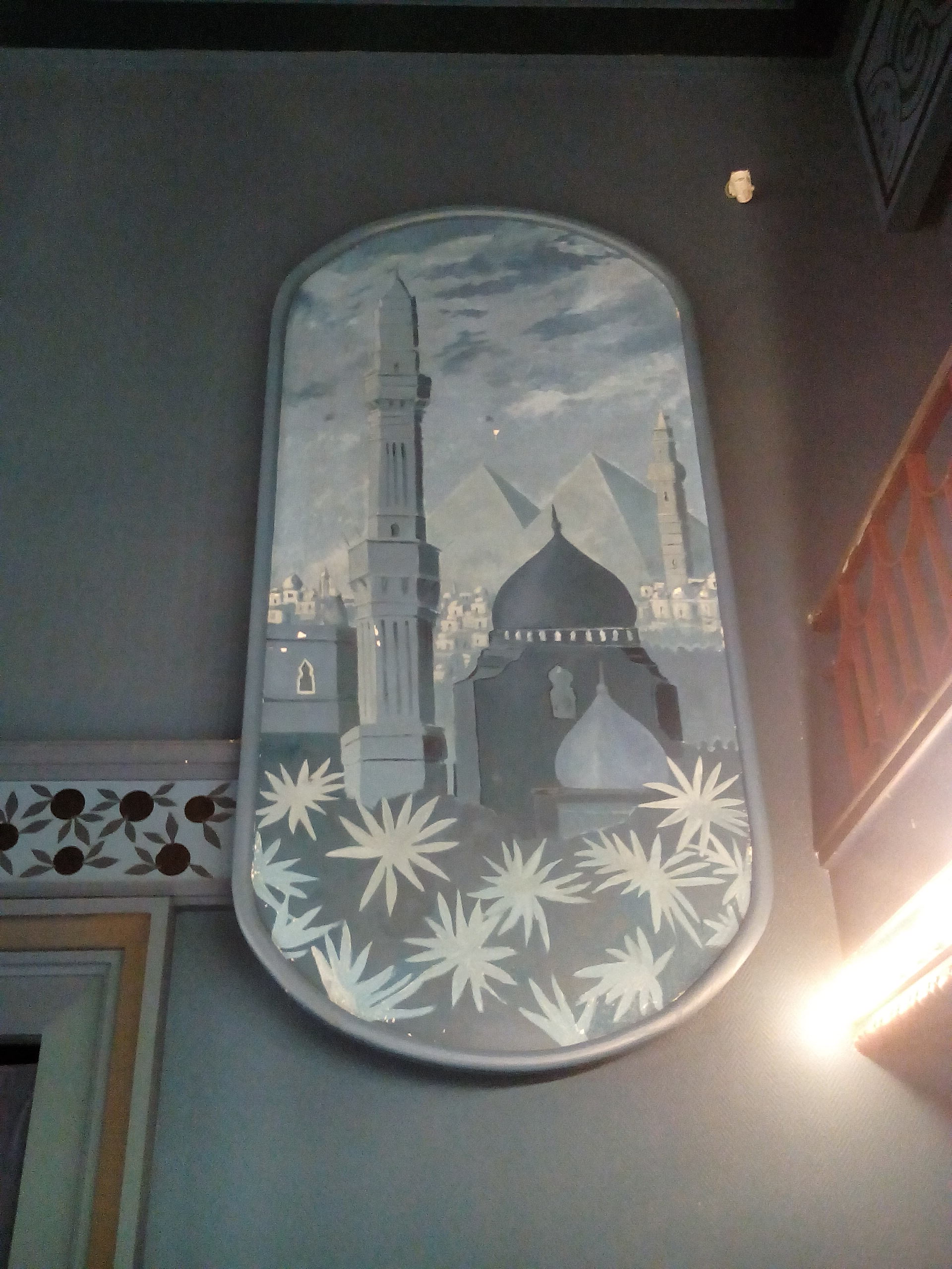 Détail d'une peinture orientalisante à l'intérieur du Cine Dore Filmoteca Española